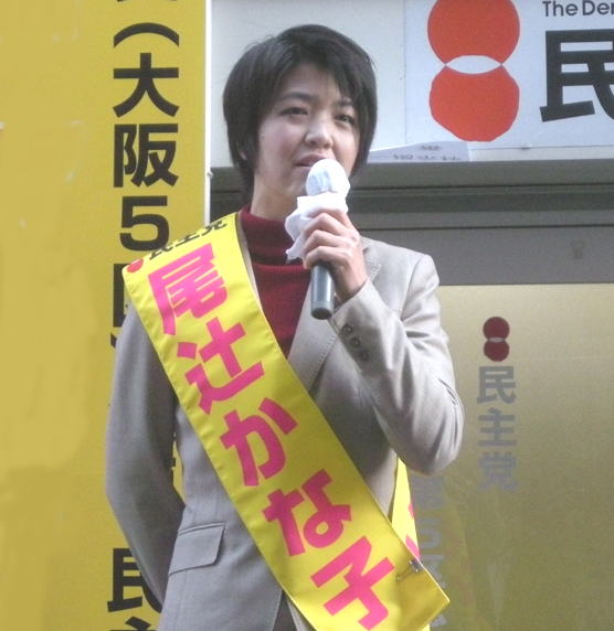 2012.12 caesar505が撮影。